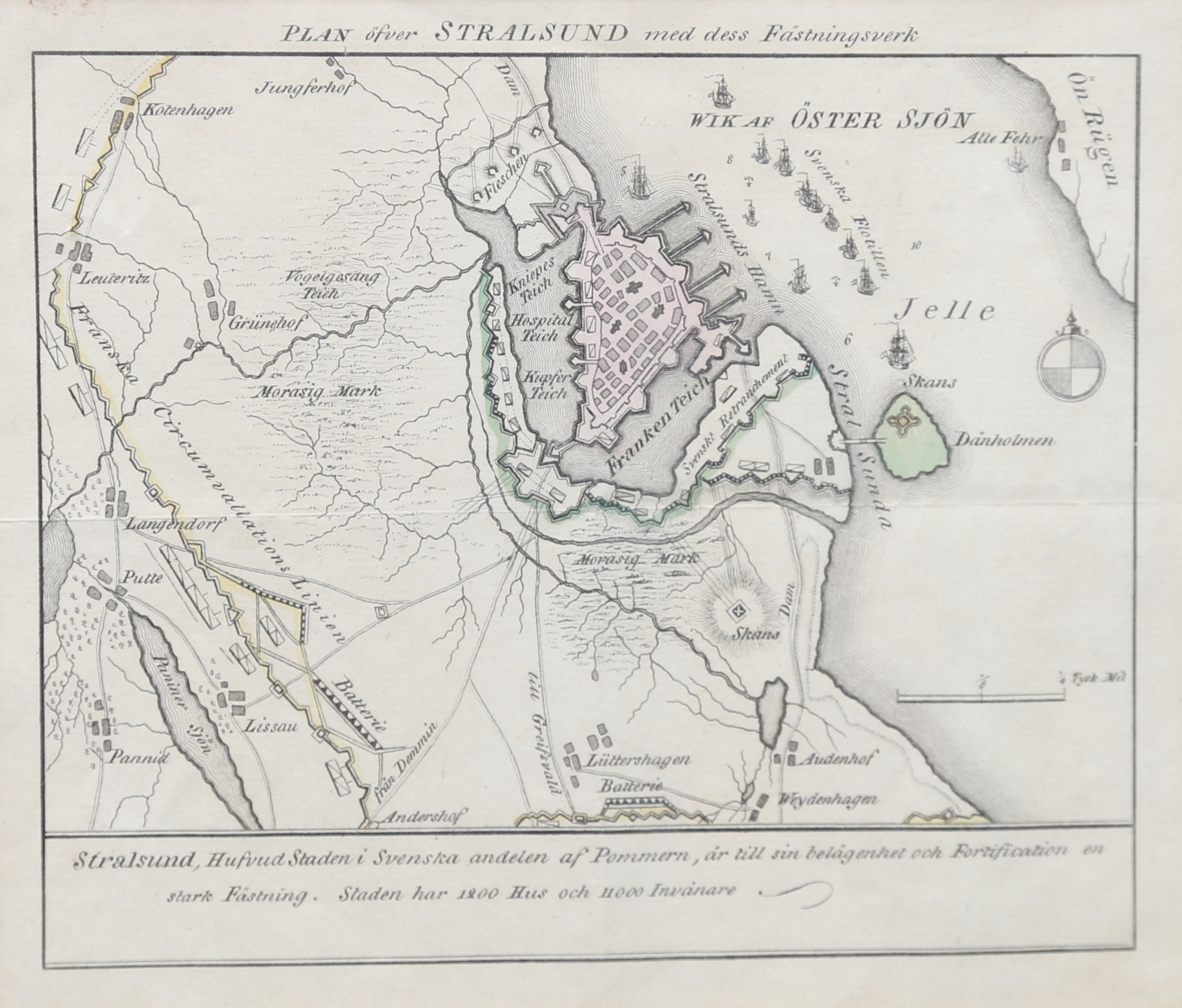 Kopparstick från sent 1700-tal som visar Stralsund med dess omgivningar och fästningsverk.